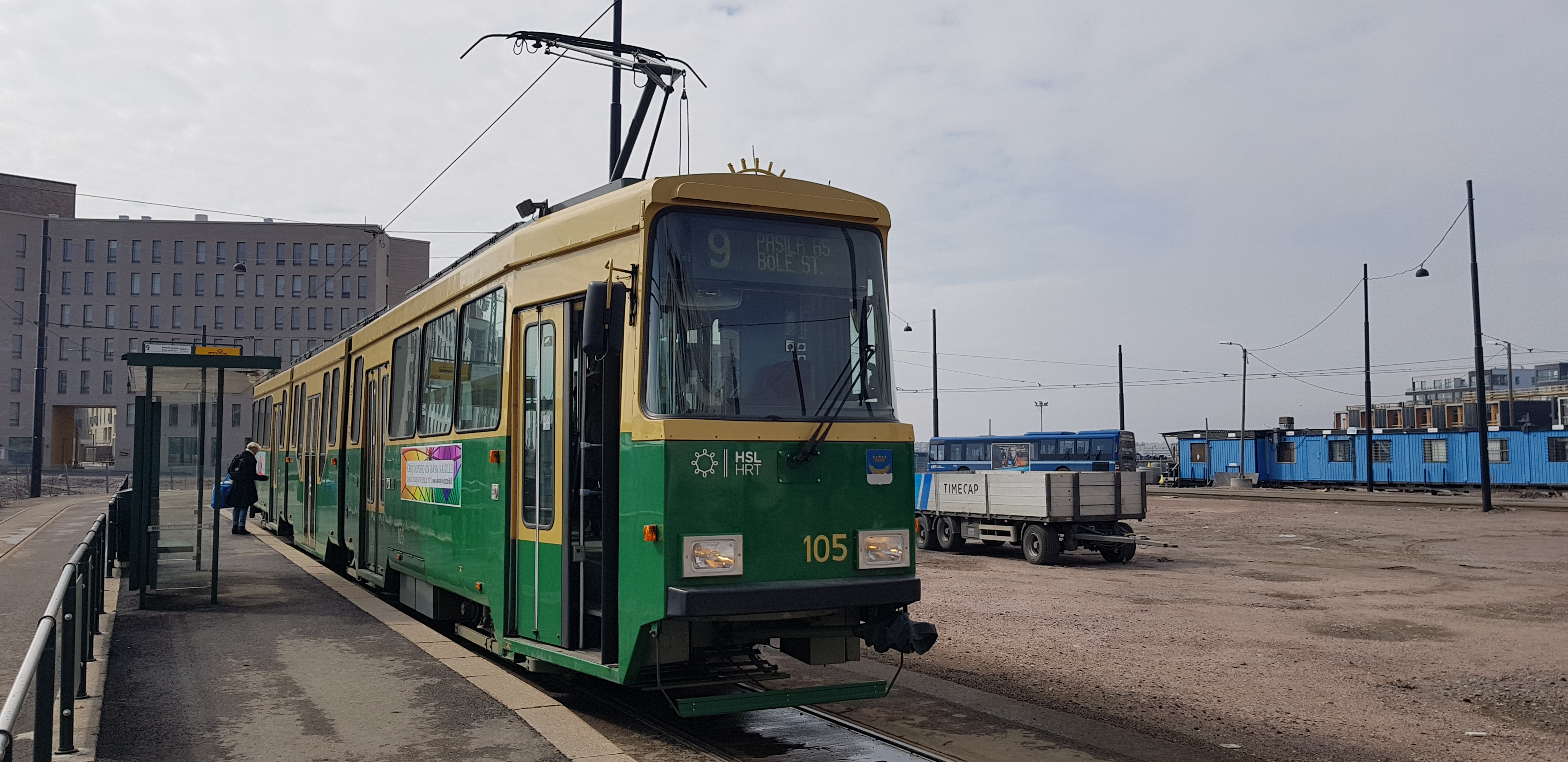 MLNRV2 #105 Saukonpaaden päätepysäkillä linjalla 9. Taustalla raitiovaunua korvaava bussi linjalla 8X.